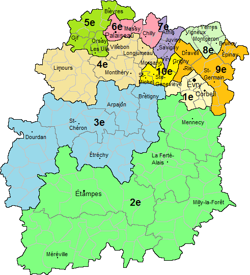 Carte des circonscriptions législatives de l'Essonne avec noms des cantons